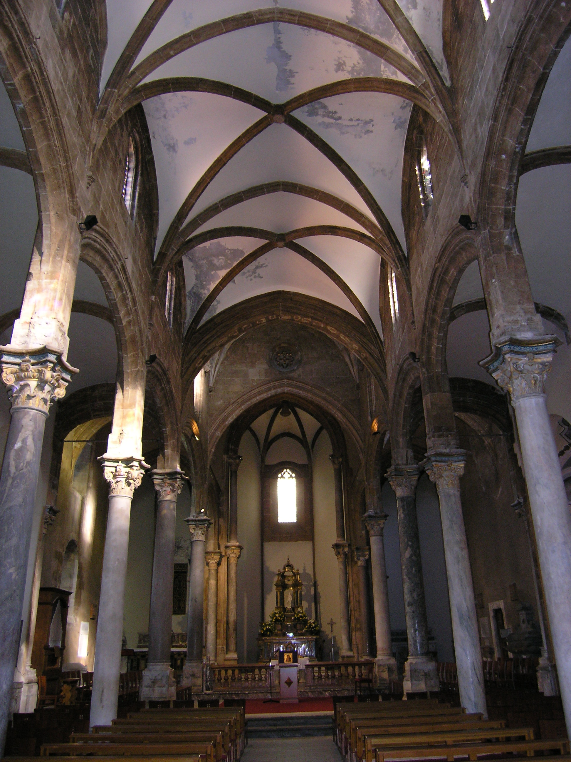 Sicilianu: Crèsia di Santa Marìa dâ Catena